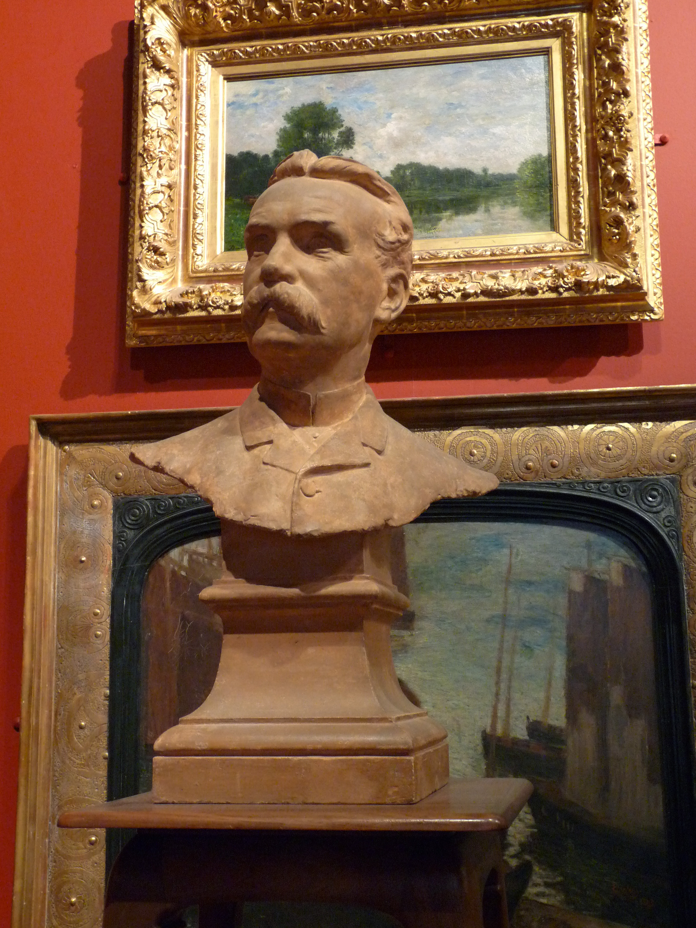 Buste d'Henry Vasnier par Léon-Joseph Chavalliaud (1858–1919) Alternative namesLeon-Joseph ChavalliaudDescriptionFrench sculptorDate of birth/death29 January 18585 February 1919Location of birth/deathReimsBoissy-sans-AvoirAuthority control : Q1879407 au Musée des beaux-arts de Reims